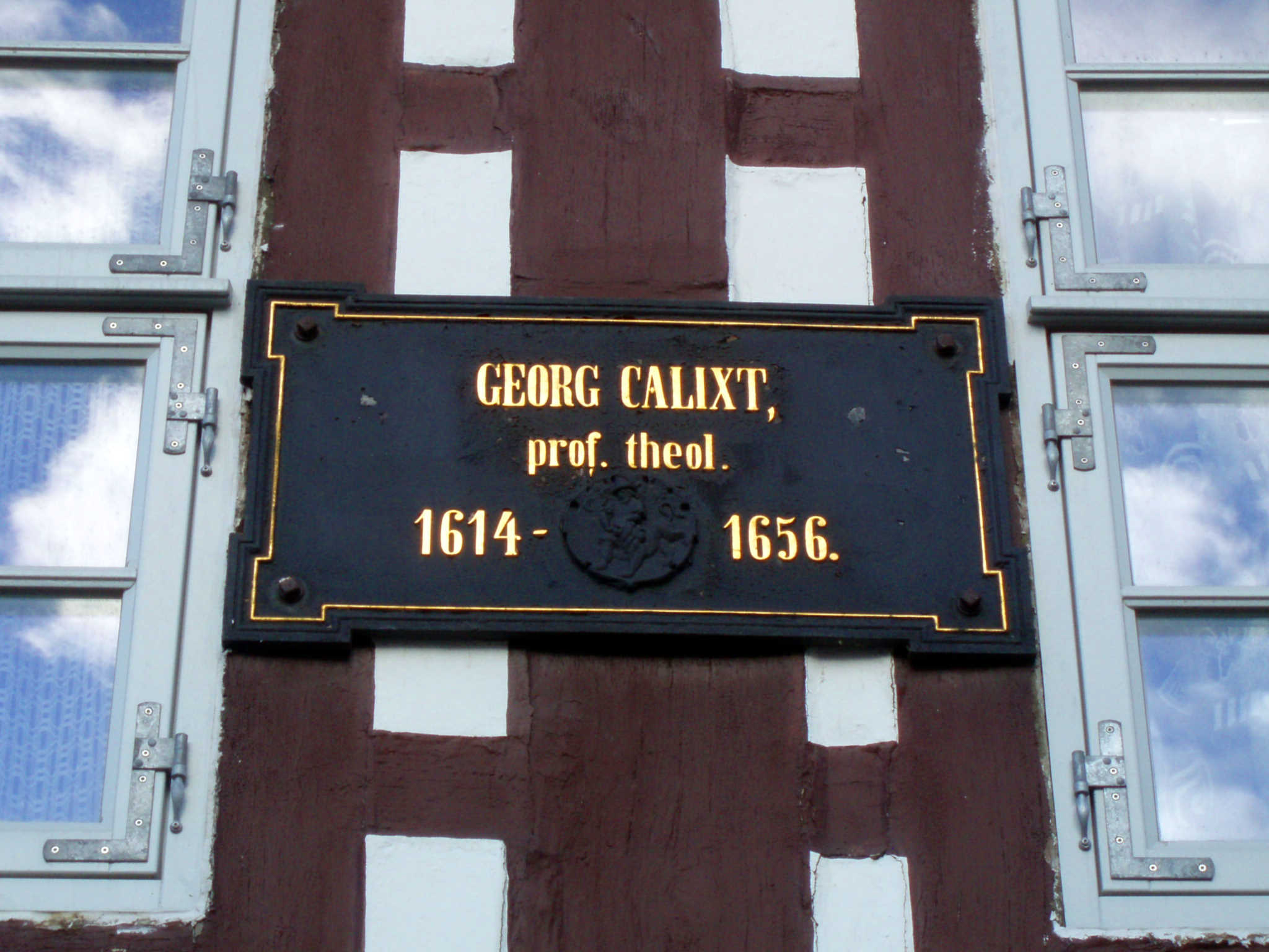 Georg-Calixt-Tafel